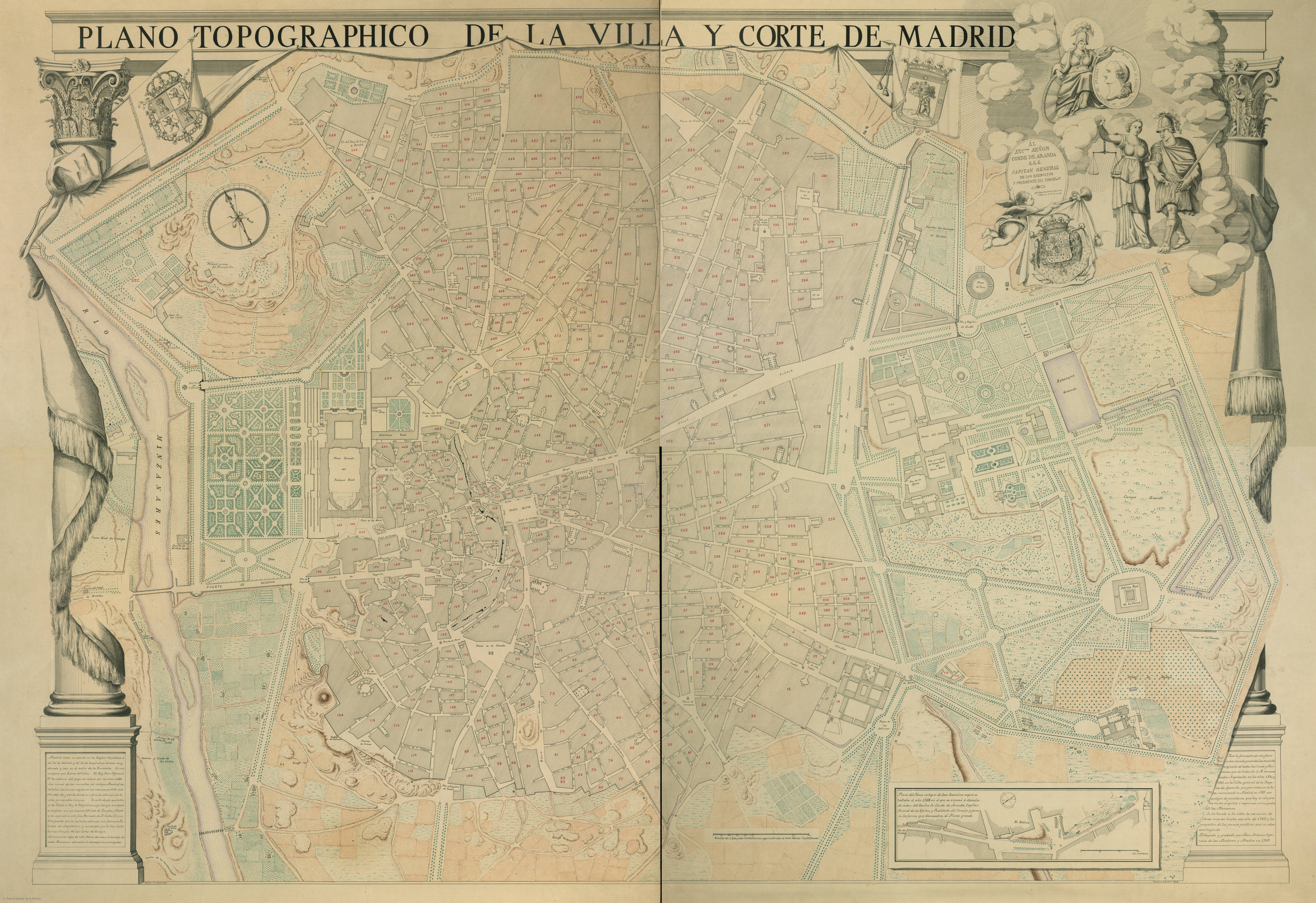 Plano topográphico de la Villa y Corte de Madrid al Excmo. Sr. Conde de Aranda, Capitán General de los Exércitos y Presidente del Consejo. Dibujado y gravado por Don Antonio Espinosa de los Monteros y Abadía en 1769.